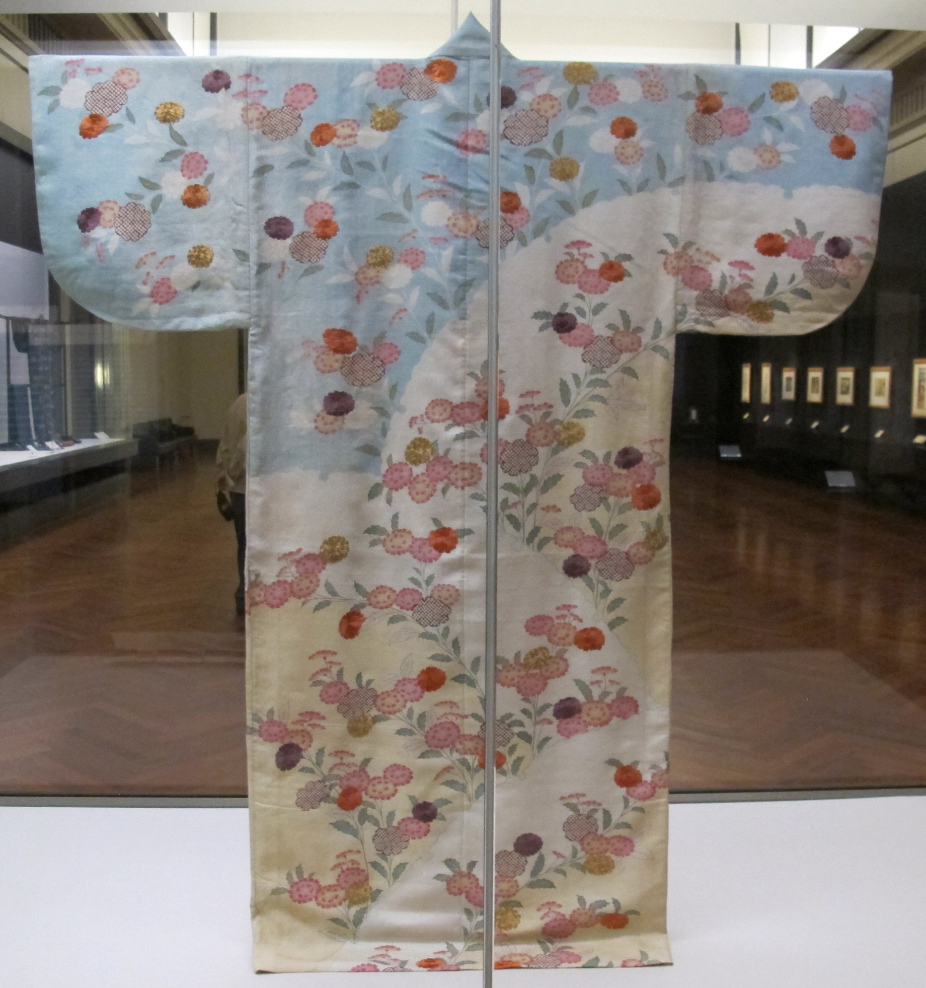 Periodo edo, kosode, XVIII sec.